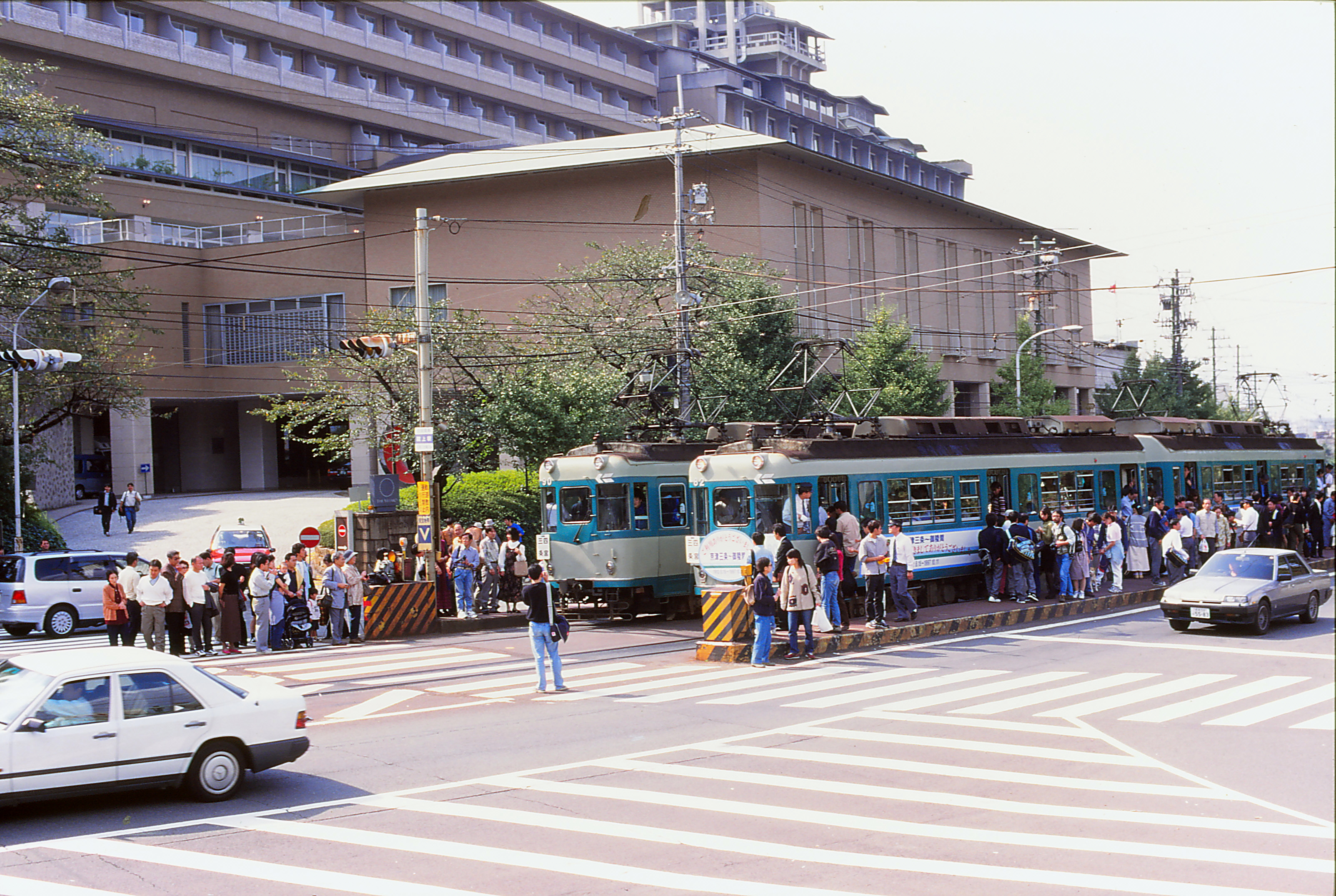 蹴上駅に停車中の80形電車 後方はウェスティン都ホテル京都